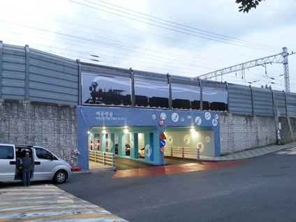 백운쌍굴. 백운역 인근의 경인철로 아래로 뚫린 굴다리. 부평공원로의 남쪽 시작지점.